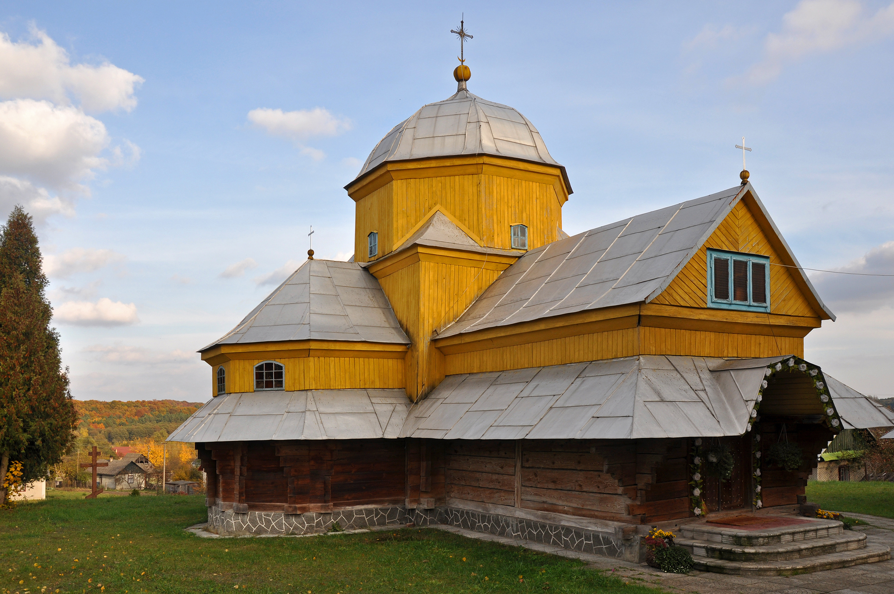 Успенська церква (дер.), с.Лелехівка